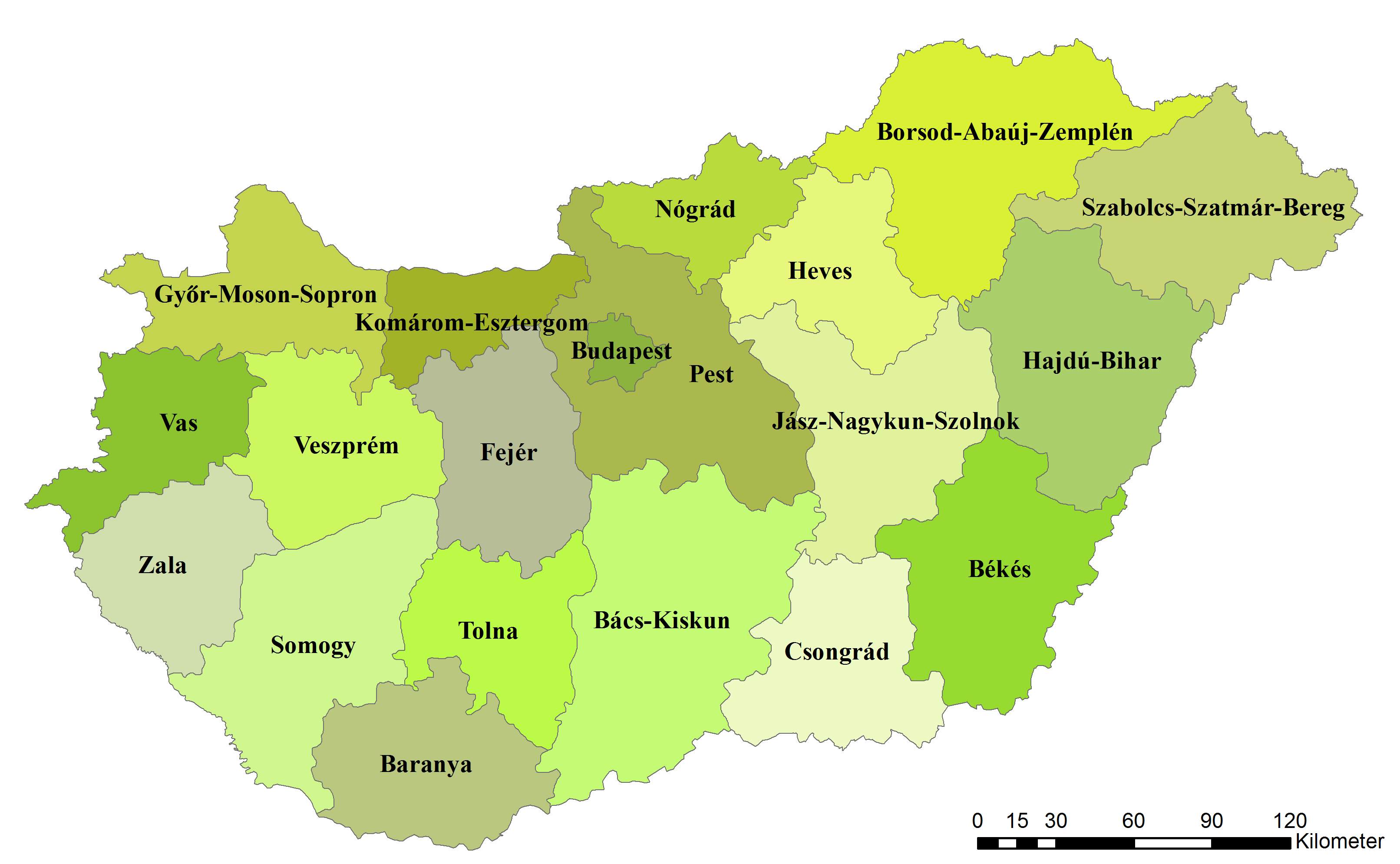 Karte der 19 Komitate Ungarns inkl. Budapest